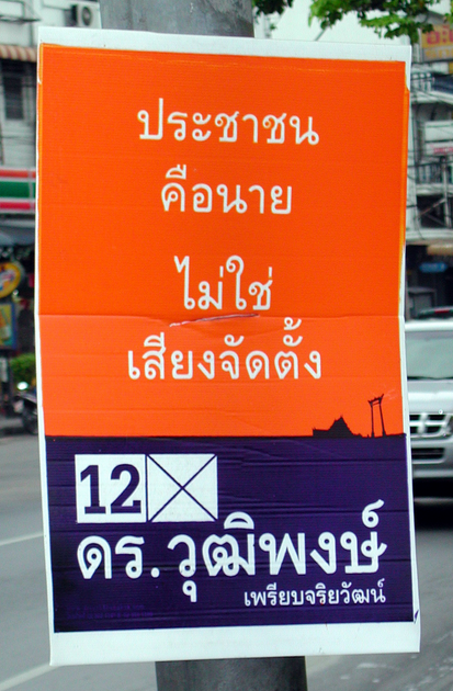 Waerth 30 aug 2004 04:50 (CEST)